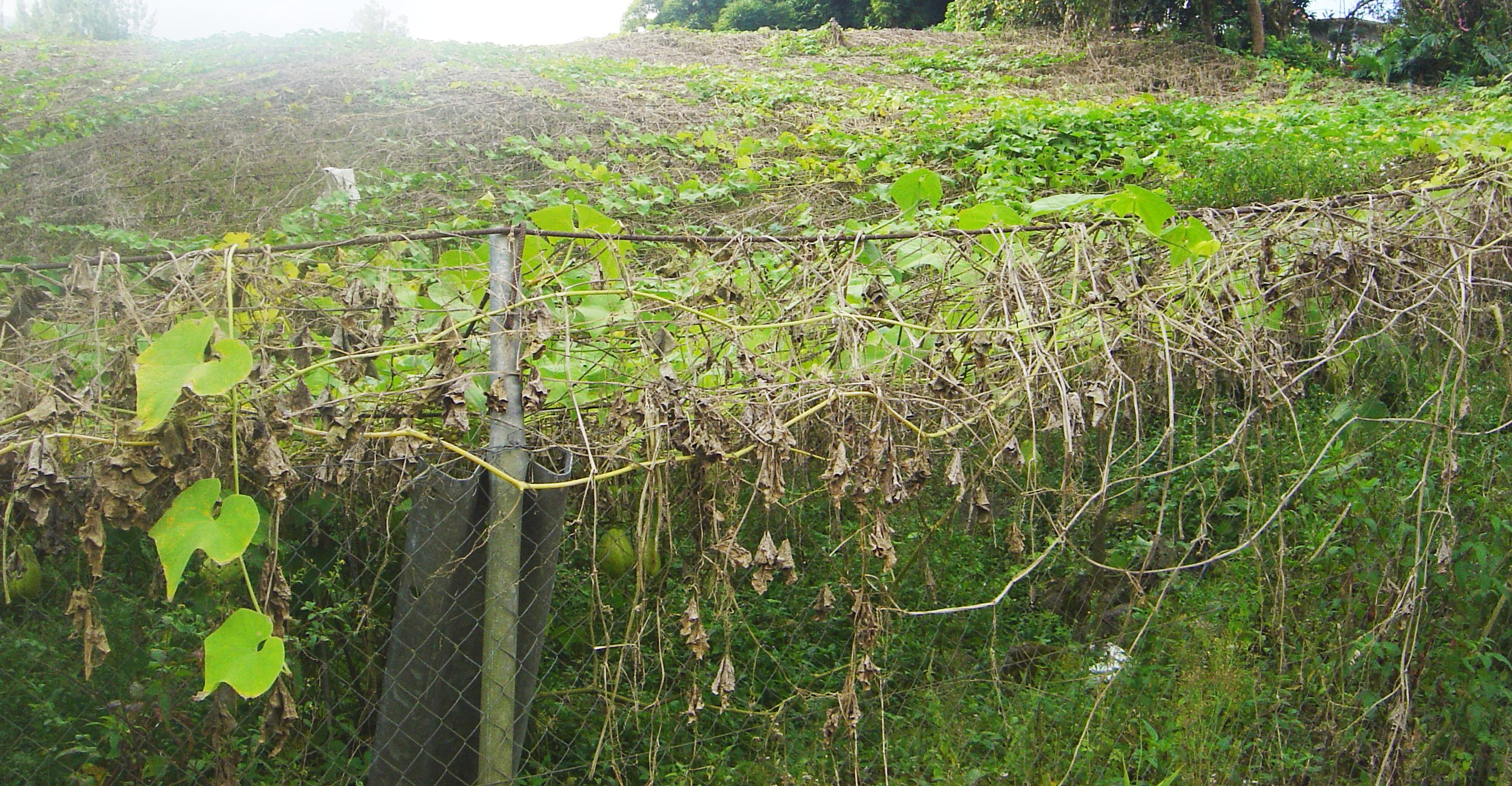 Sechium edule (chayote) plantation in the Îlet-à-Vidot, Cirque de Salazie, Réunion Island